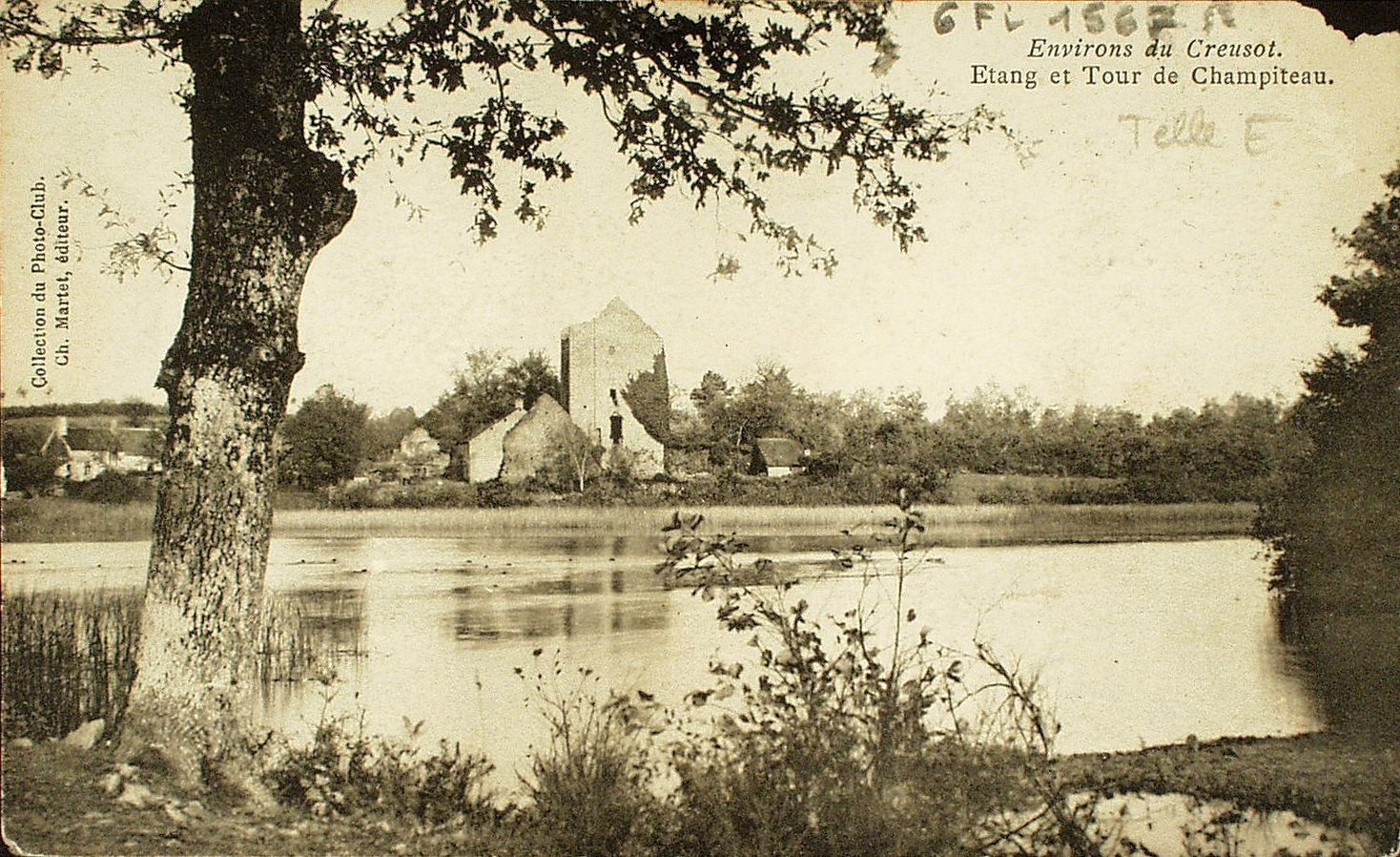 Tour de Champiteau de Saint-Firmin Saône-et-Loire